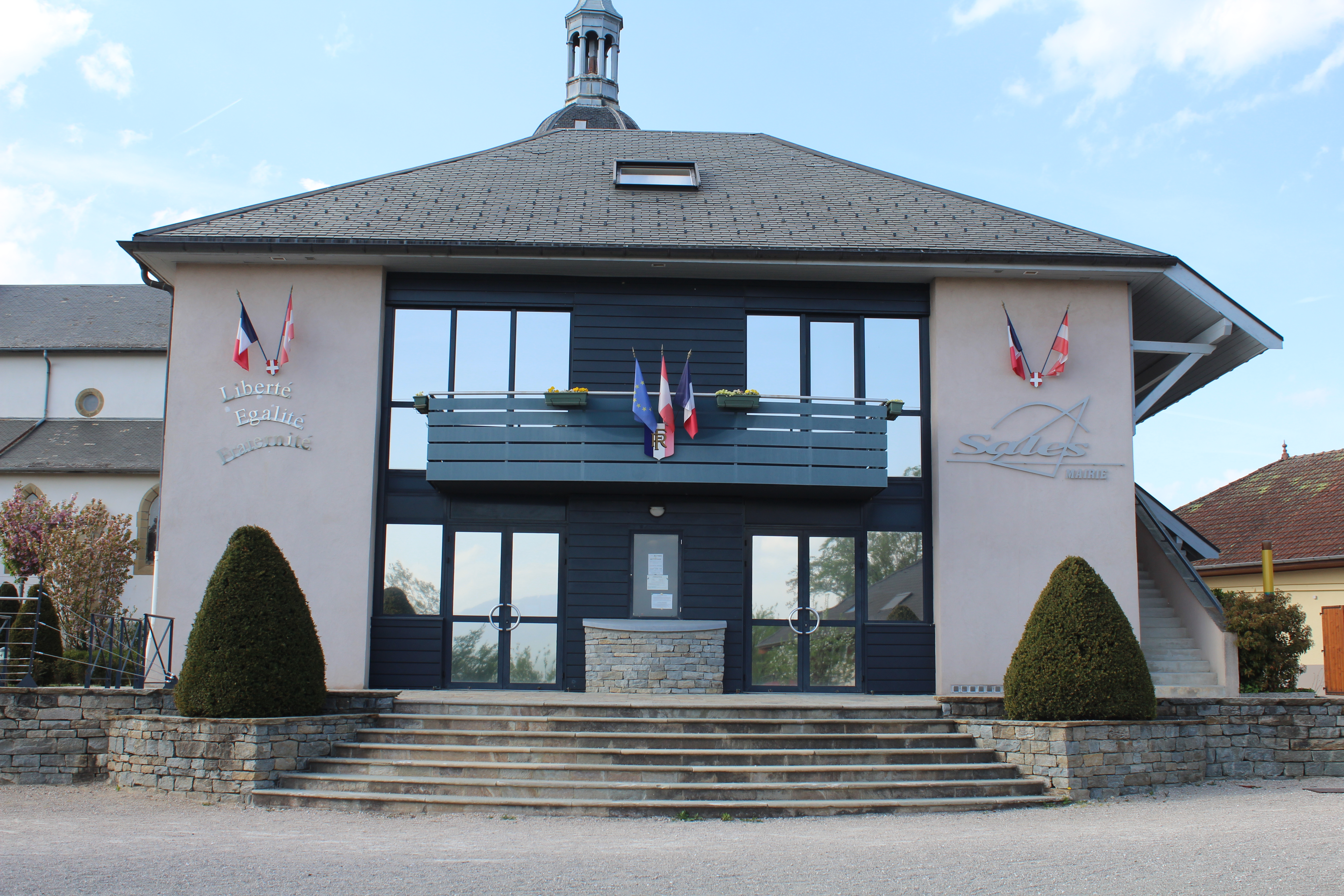 Mairie de Sales, Haute-Savoie.